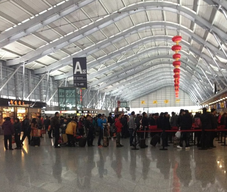 郑州新郑国际机场